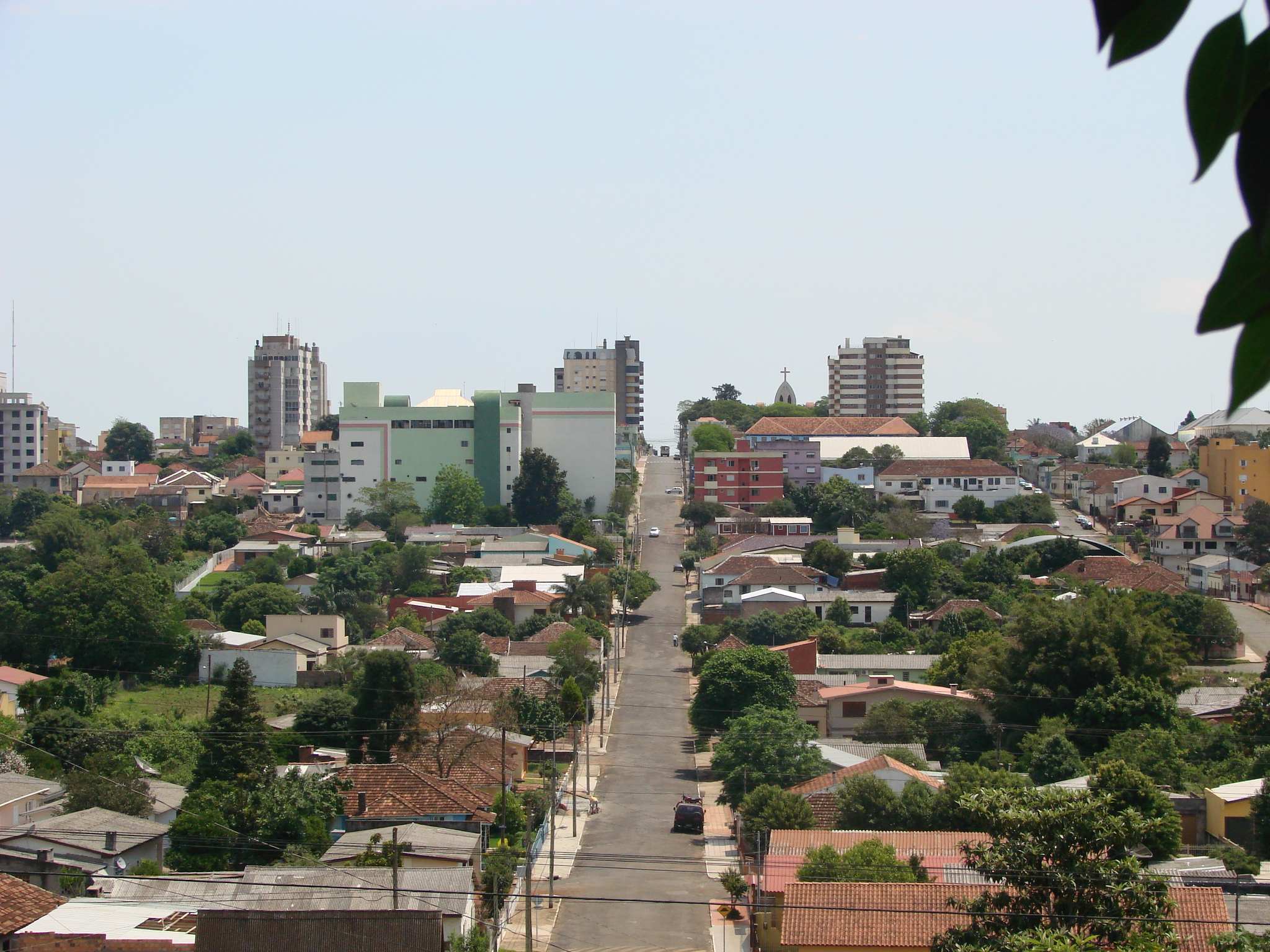 Vista da Rua Coronel Pillar, por onde ocorre anualmente a procissão de Nossa Senhora de Fátima, em Cruz Alta, a partir da Catedral até o Monumento.